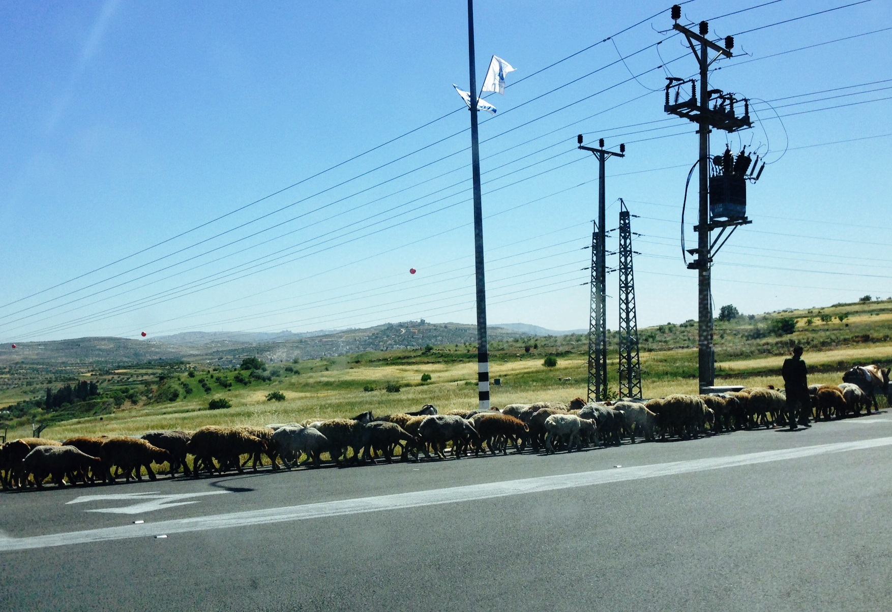 הכפר הפלסטיני ג'ינסאפוט - עדר כבשים